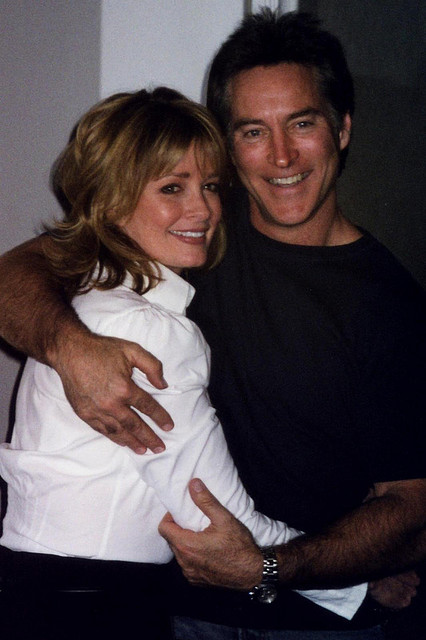 Deidre Hall & Drake Hogestyn Beverly Hills Event